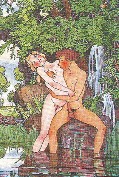 Книга Маркизы